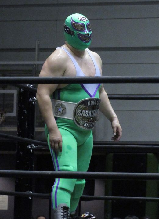 2018年5月27日・大阪府立体育館第二競技場